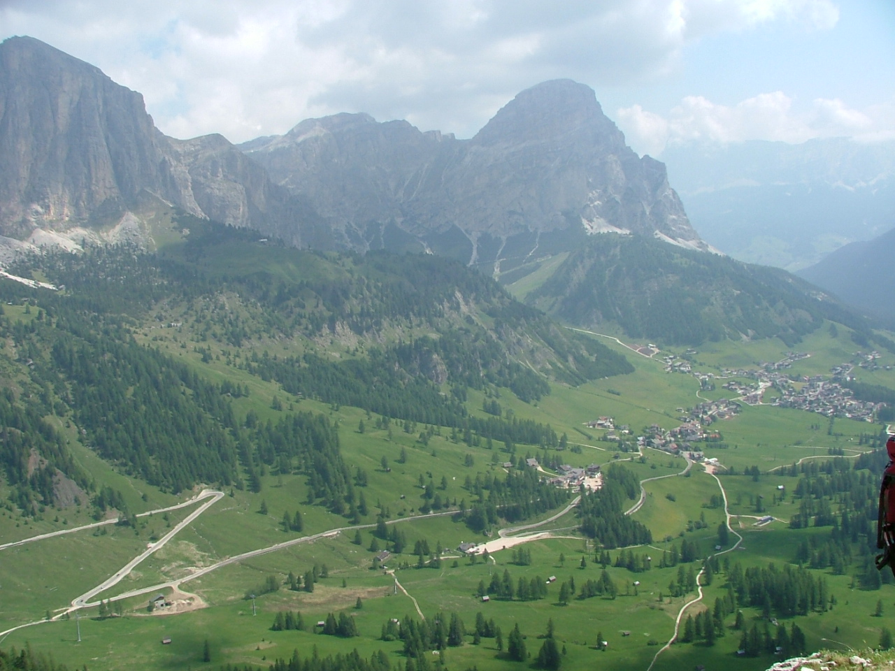 Corvara und die Berge